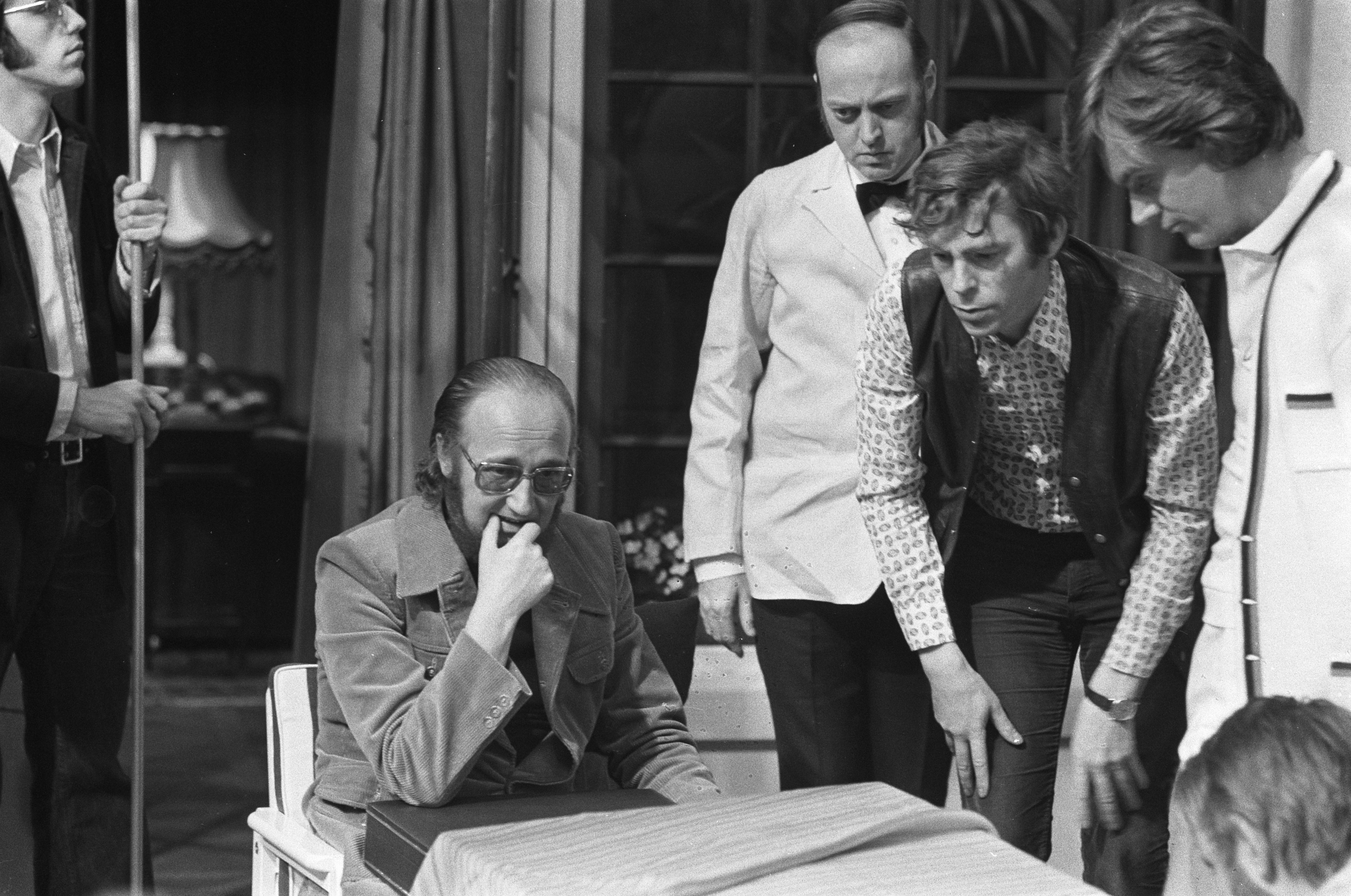 Collectie / Archief : Fotocollectie Anefo Reportage / Serie : [ onbekend ] Beschrijving : Televisiedrama "Martha" (KRO), v.l.n.r. IJf Blokker, Adrian Brine, Berend Boudewijn en Carol van Herwijnen Datum : 7 mei 1974 Trefwoorden : acteurs, regisseurs, televisiespelen Persoonsnaam : Blokker, IJf, Boudewijn, Berend, Brine, Adrian, Herwijnen, Carol van Fotograaf : Punt, […] / Anefo Auteursrechthebbende : Nationaal Archief Materiaalsoort : Negatief (zwart/wit) Nummer archiefinventaris : bekijk toegang 2.24.01.05 Bestanddeelnummer : 927-1760 Reacties Geplaatst door Televisiefan op 01 juli 2016 - 21:15. Uitgezonden op 19 september 1974 (opgenomen op 7 mei 1974)